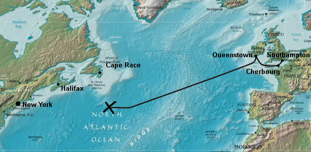 Itinéraire du Titanic